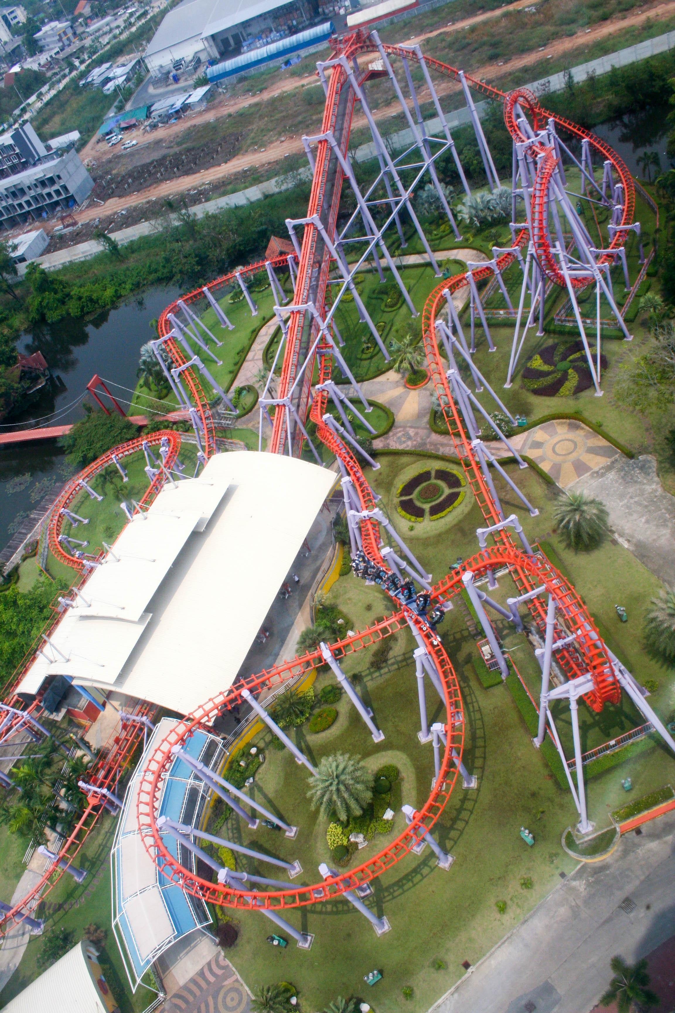 1 of the 2 World's largest Suspended Looping Coaster.